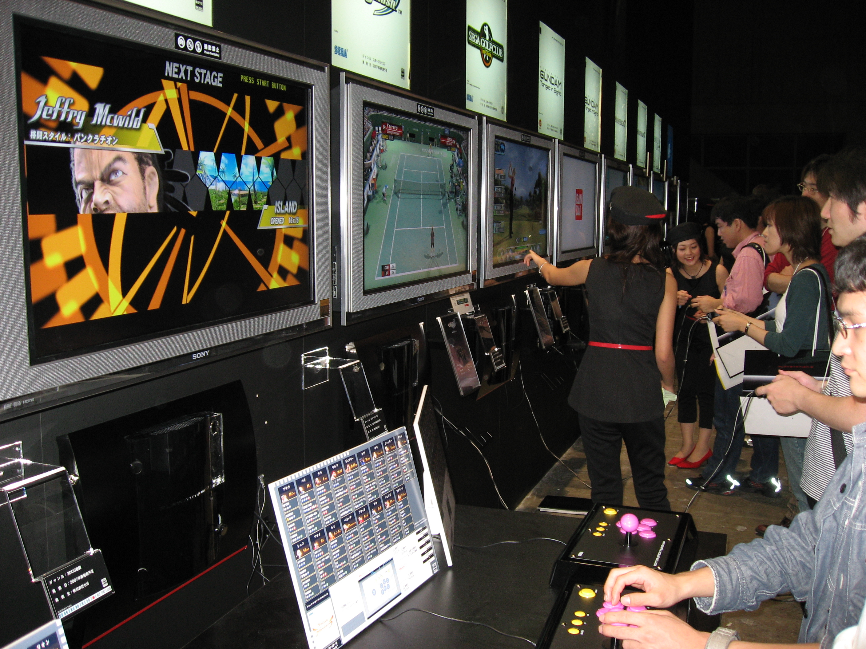 PS3 station at TGS 2006 東京ゲームショー２００６年のソニーPS3のブース